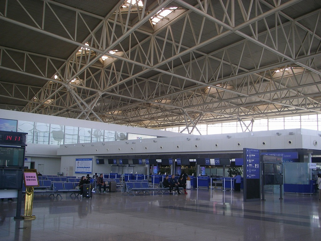 天津浜海国際空港国際線出発口